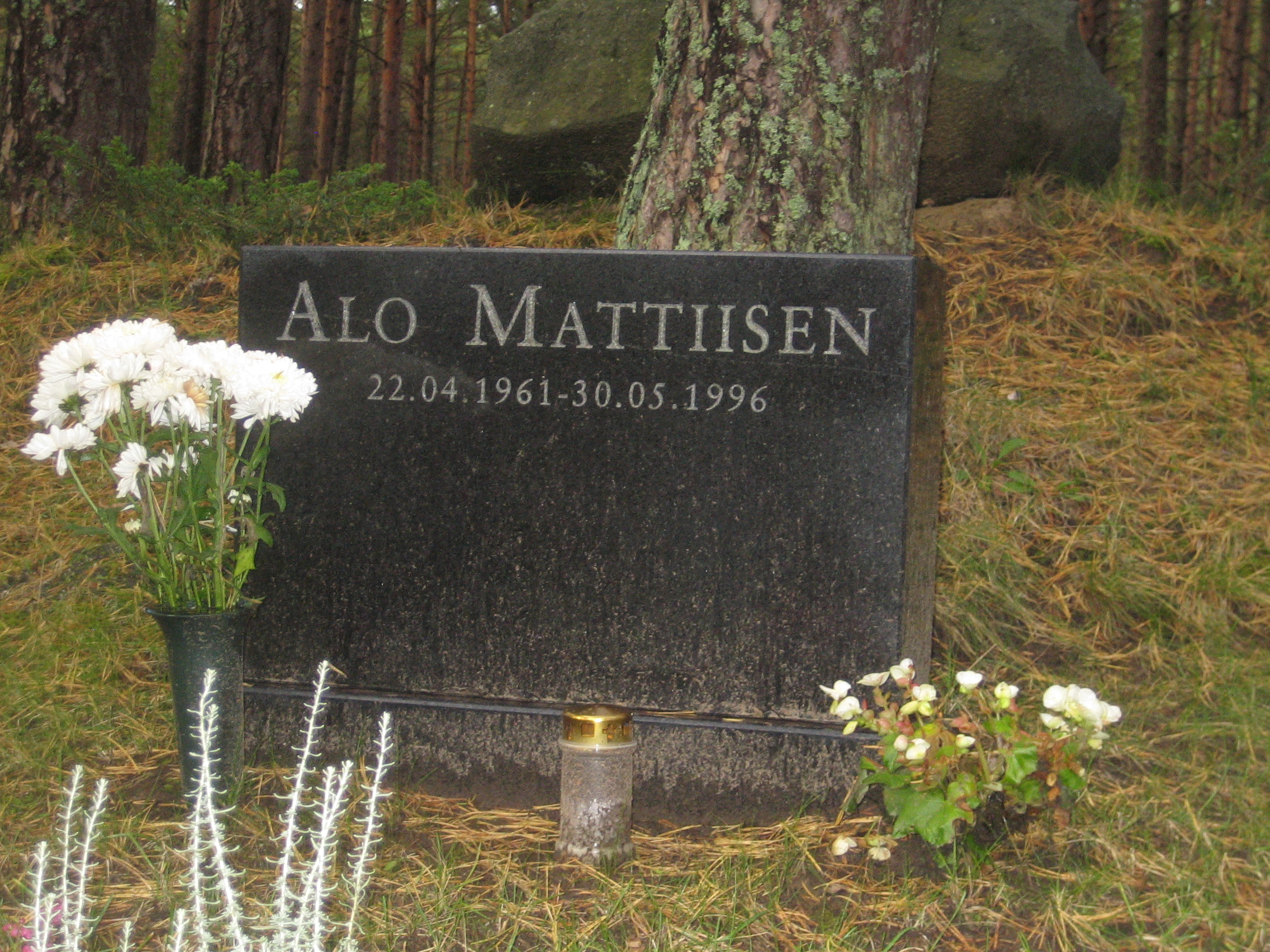 Alo Mattiiseni haud Metsakalmistul